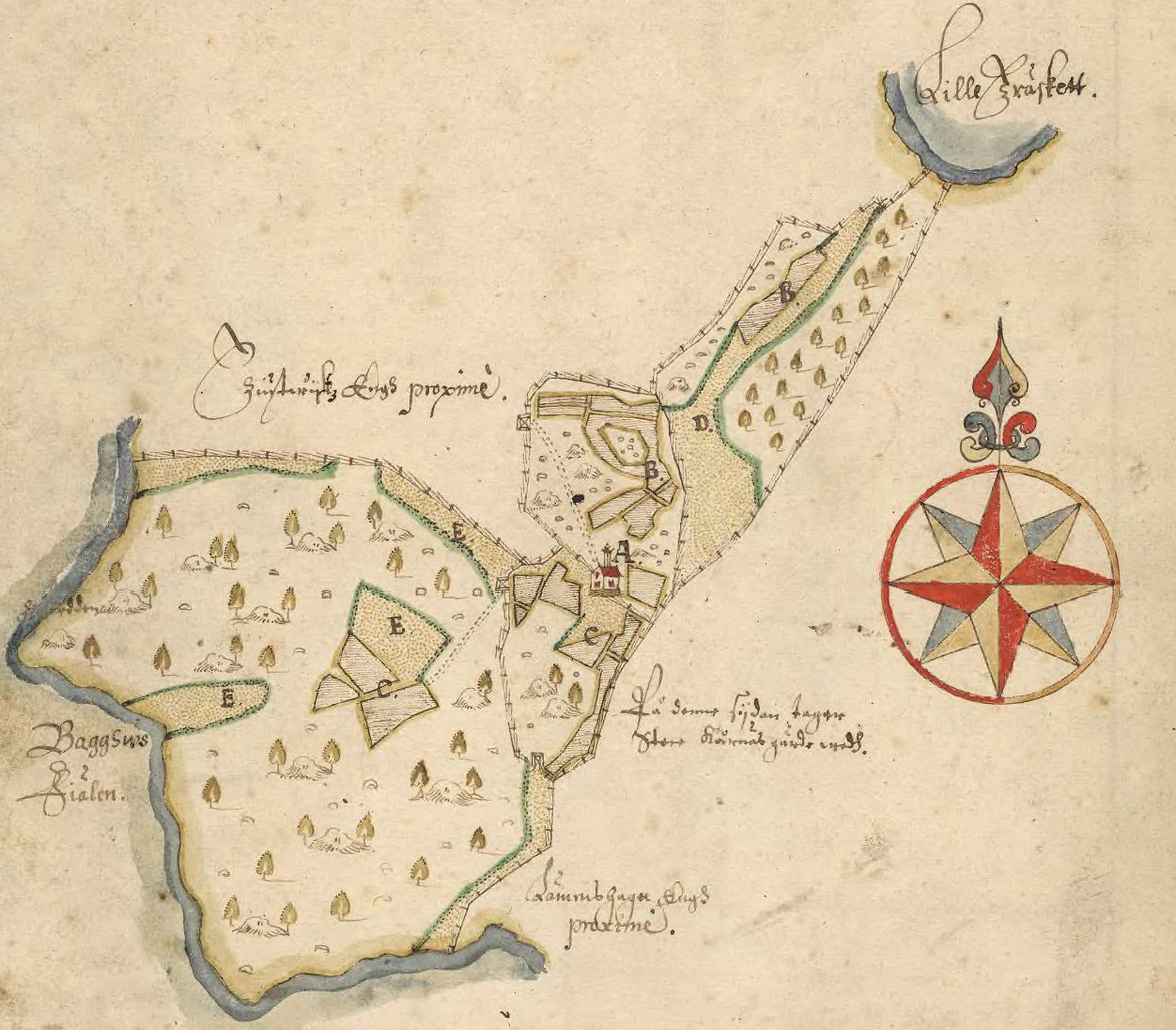 Ingarö socken Beatelund nr 1 Geometrisk avmätning